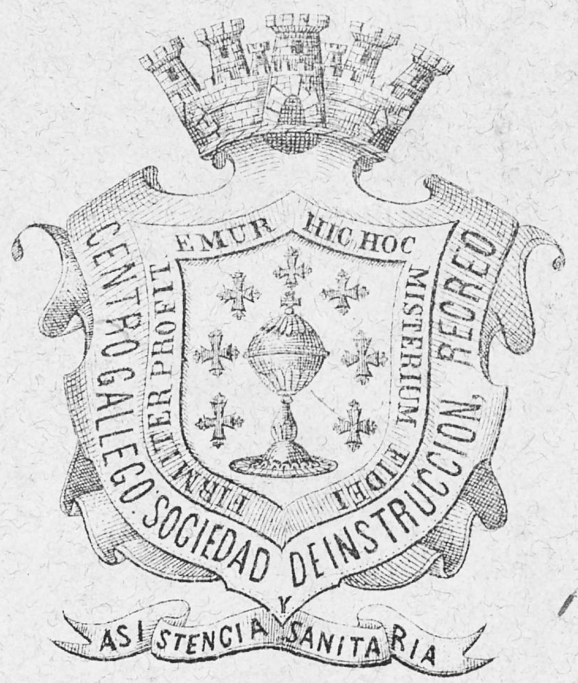 Escudo de Galiza como escudo do Centro Galego da Habana, constituído no ano 1879.